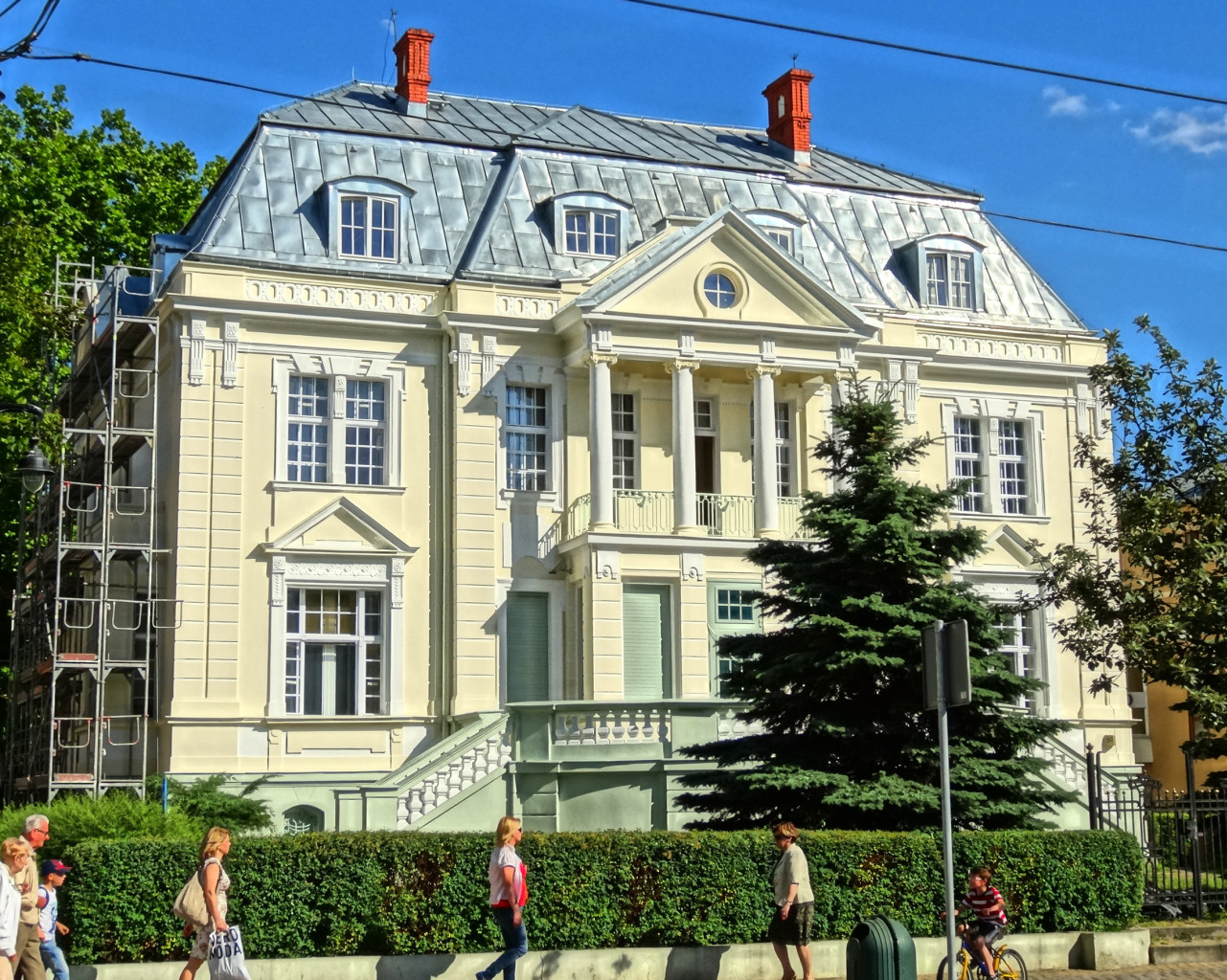 Willa przy ul. Gdańskiej 50 w Bydgoszczy (radio PiK)